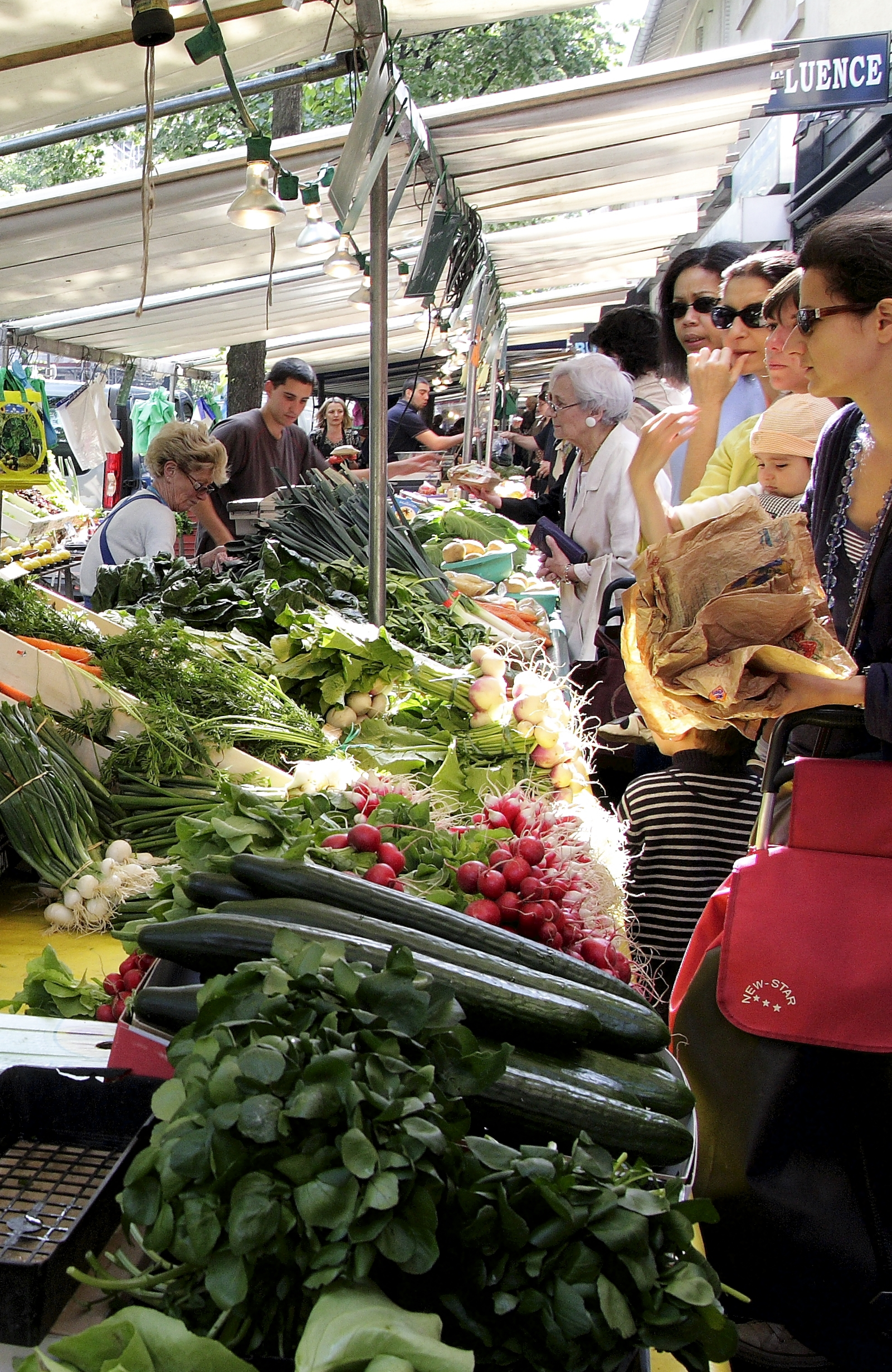 Marché rue de la Convention